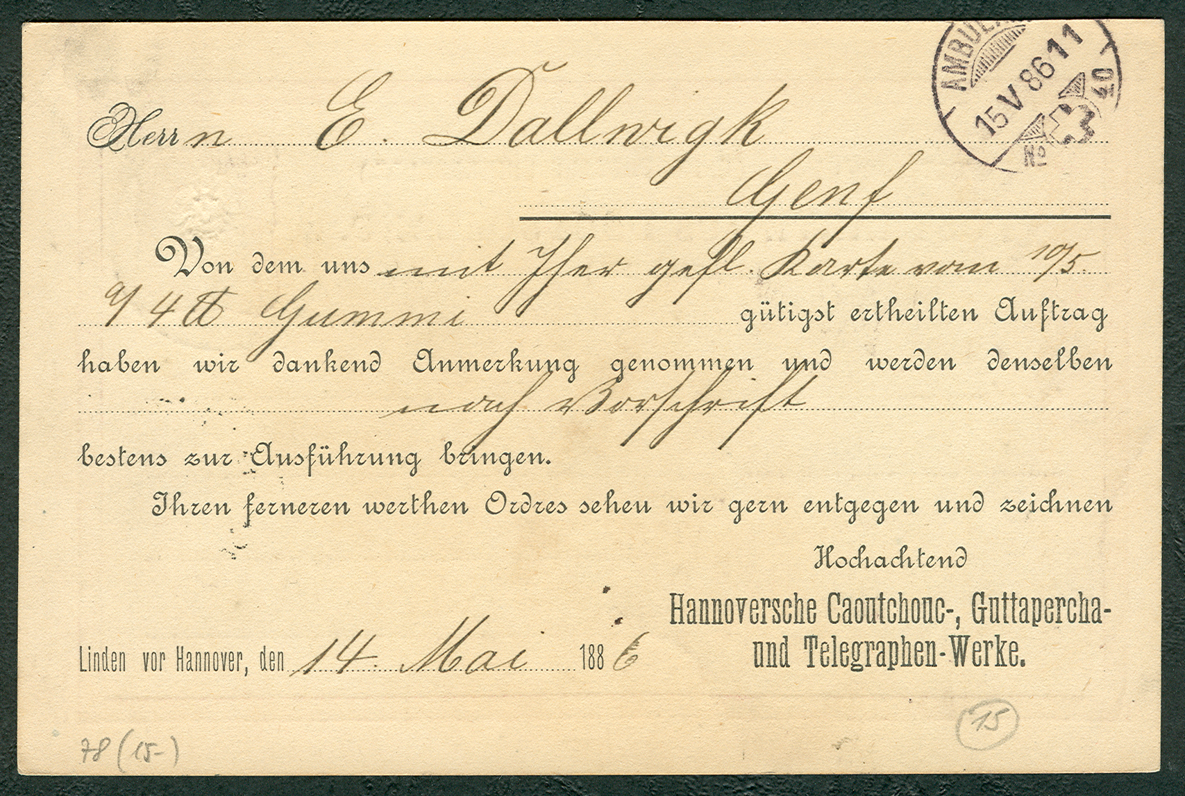 1886 ausgefüllter Vordruck einer Auftragsbestätigung der Firma Hannoversche Caoutchouc-, Guttapercha- und Telegraphen-Werke) in der damals noch eigenständigen Stadt 'Linden vor Hannover". „Herrn E. Dallwigk / Genf / Von dem uns mit Ihrer gefl.(geflissentlichen) Karte vom 10.5. / ... 4 u (Pfund) Gummi gütigst ertheilten Auftrag / haben wir dankend Anmerkung genommen und werden denselben / nach Vorschrift / bestens zur Ausführung bringen. / Ihren ferneren werthen Ordres sehen wir gern entgegen und zeichnen / Hochachtend / Linden vor Hannover, den 14. Mai 1886 / Hannoversche Caoutchouc-, Guttapercha- und Telegraphen-Werke.“ Der schweizer Ankunftstempel vom 15. Mai 1886 oben rechts meint vermutlich "Ambulanz" oder "Ambulant No. 40". Demgegenüber findet sich auf der Adressseite der Karte (siehe unten) ein zusätzlicher Stempel vom "Bureau des Facte..." mit dem Datum "17."